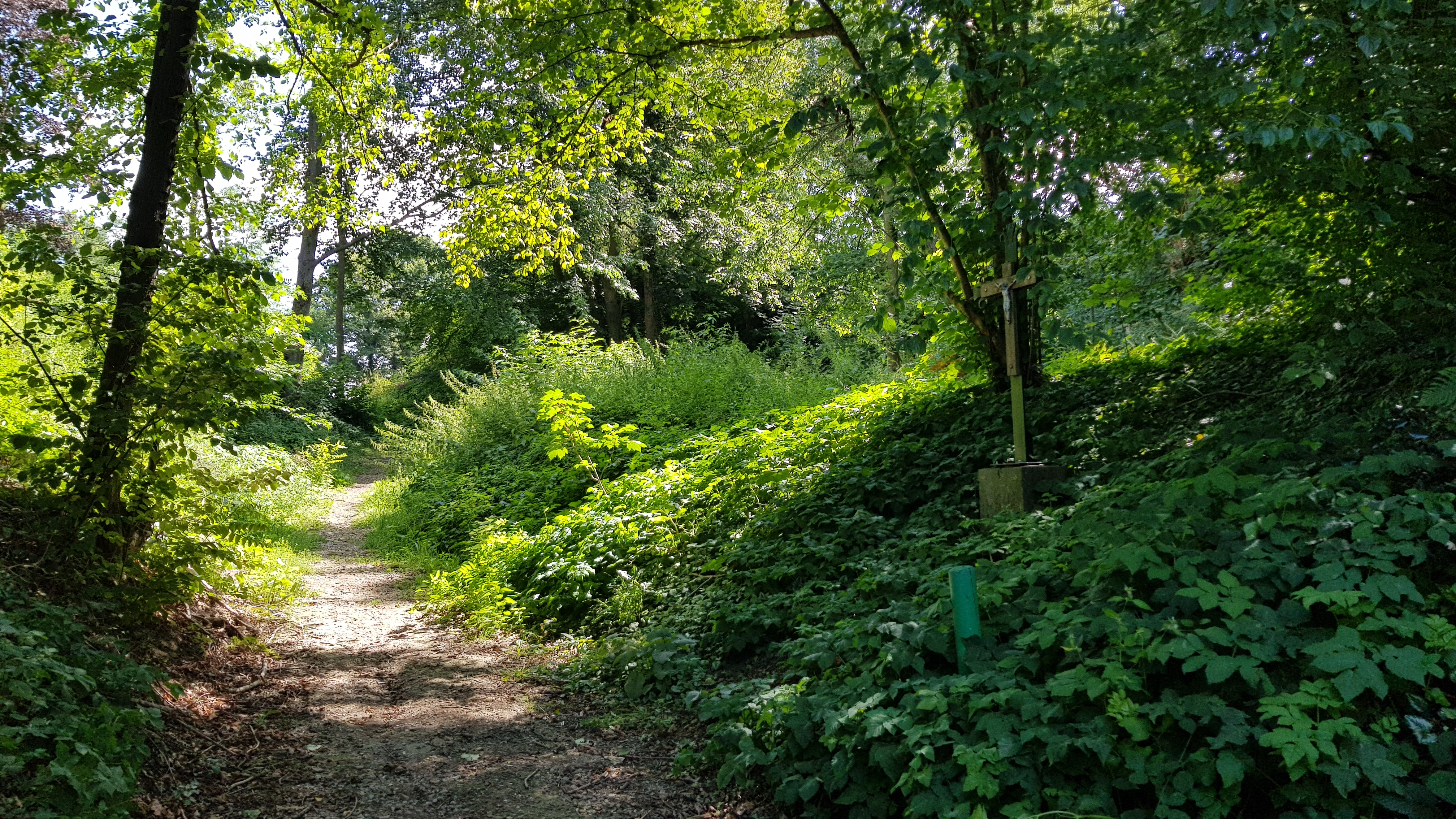 wegkruis aan de rand van het Bemelerbosch op de Krekelberg, Bemelen, Nederland